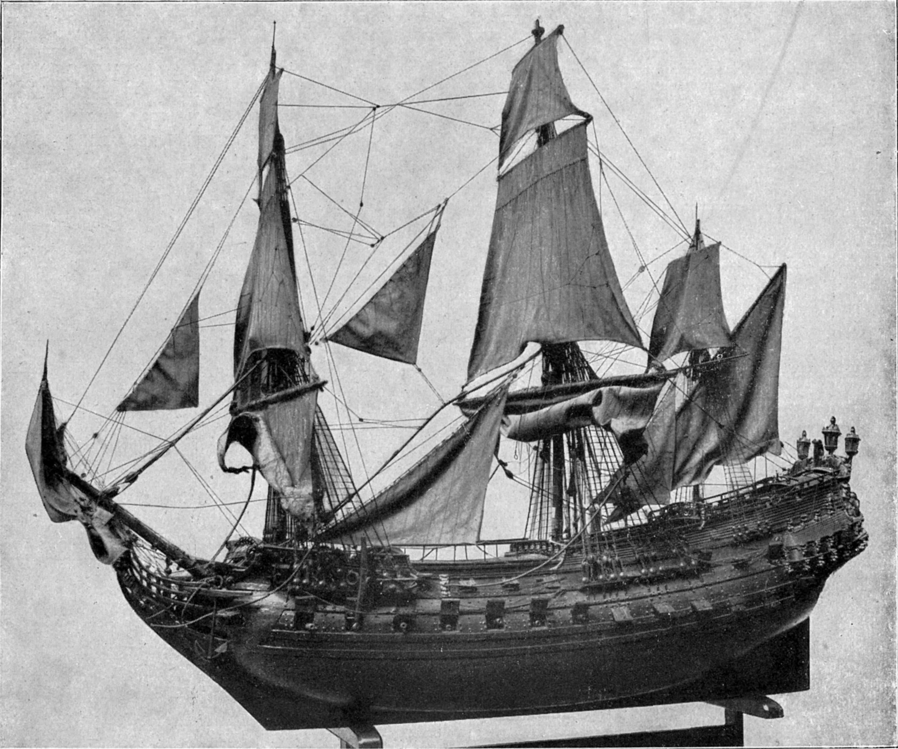 Gesamtansicht des Modells